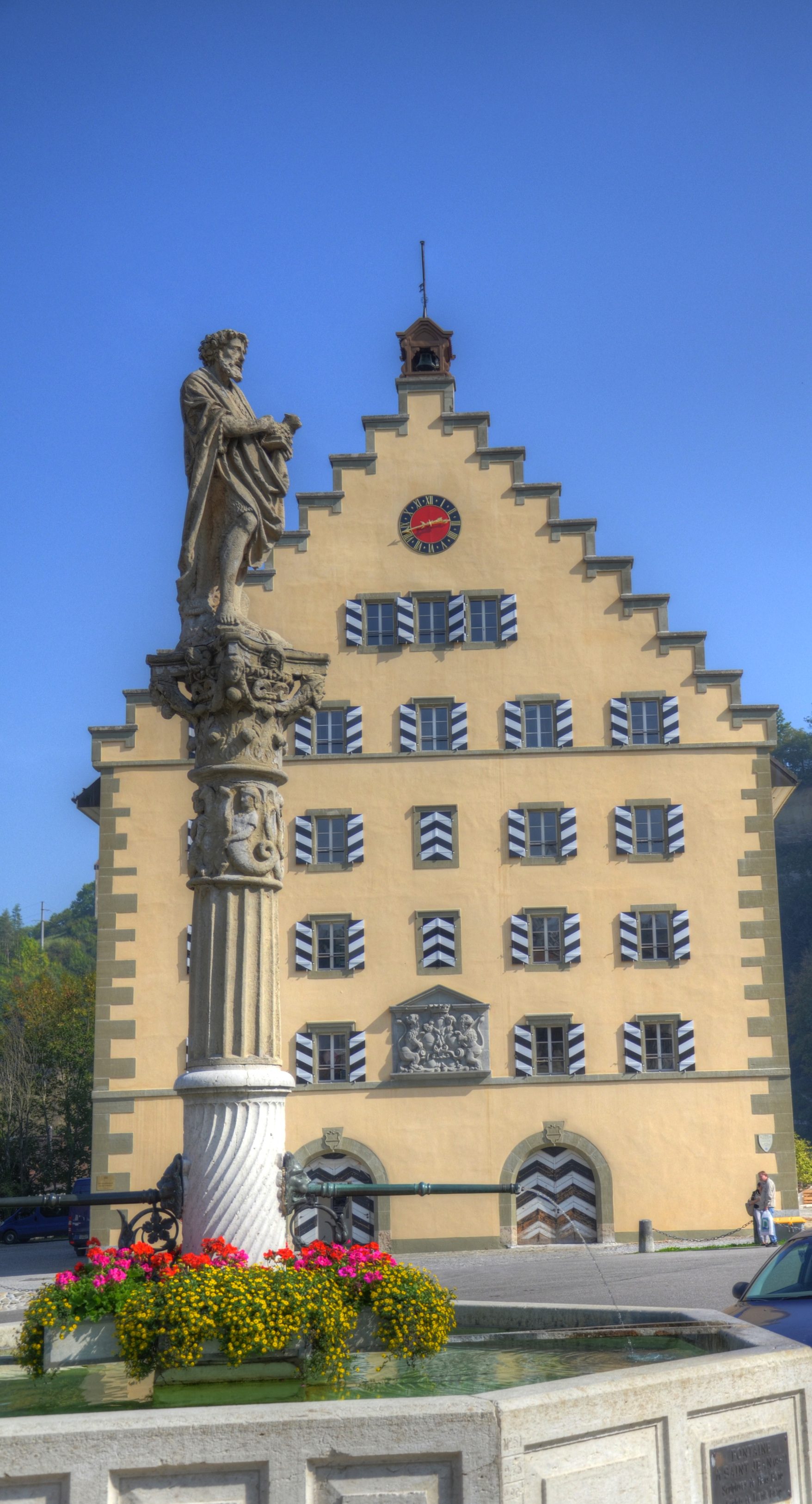 Planche Superieur, CH-1700 Fribourg